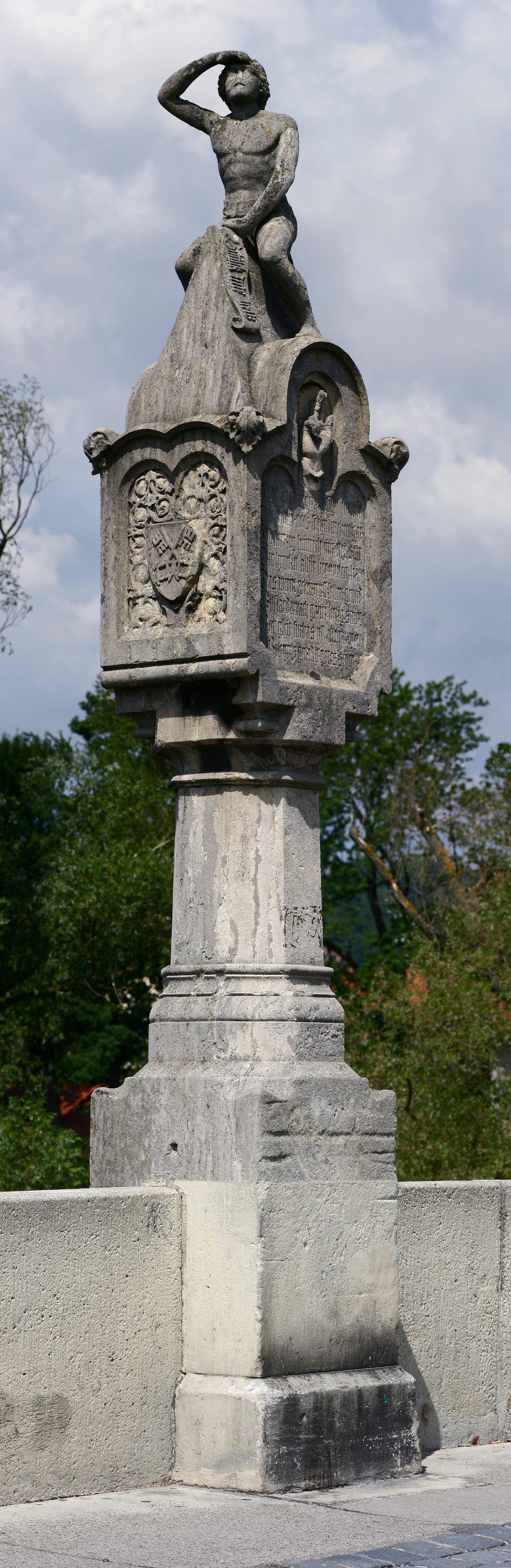 Bruckmandl auf der Steinernen Brücke in Regensburg